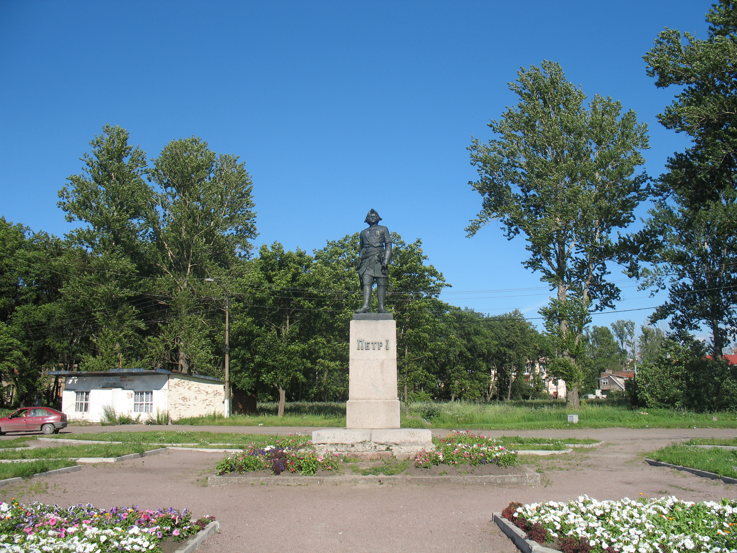 Peter I monument, Shlisselburg, Russia